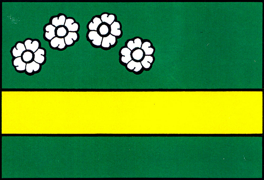 Česky: vlajka obce Norberčany